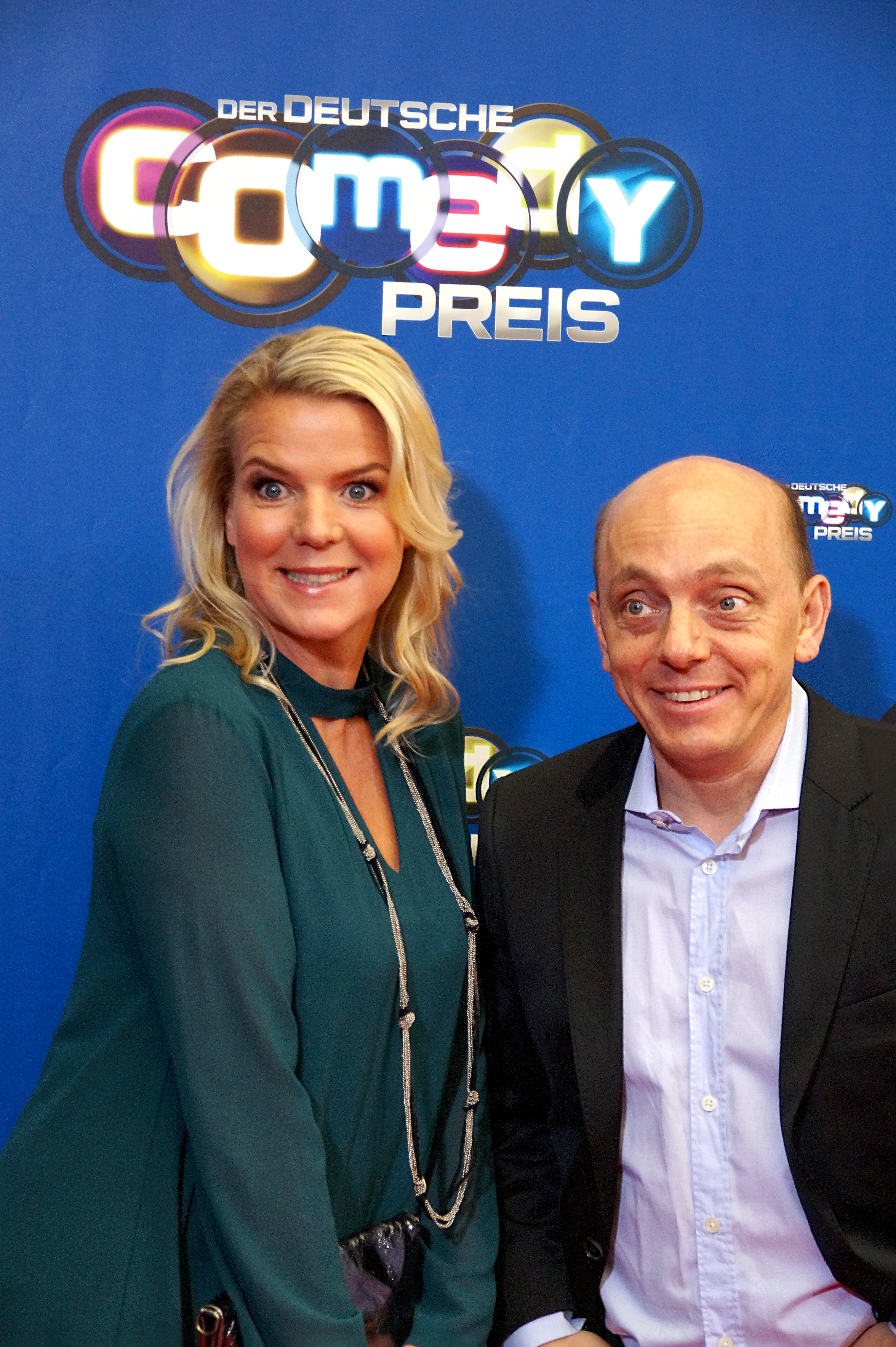 Mirja Boes und Bernhard Hoecker beim Comedypreis 2016, Oktober, Köln.